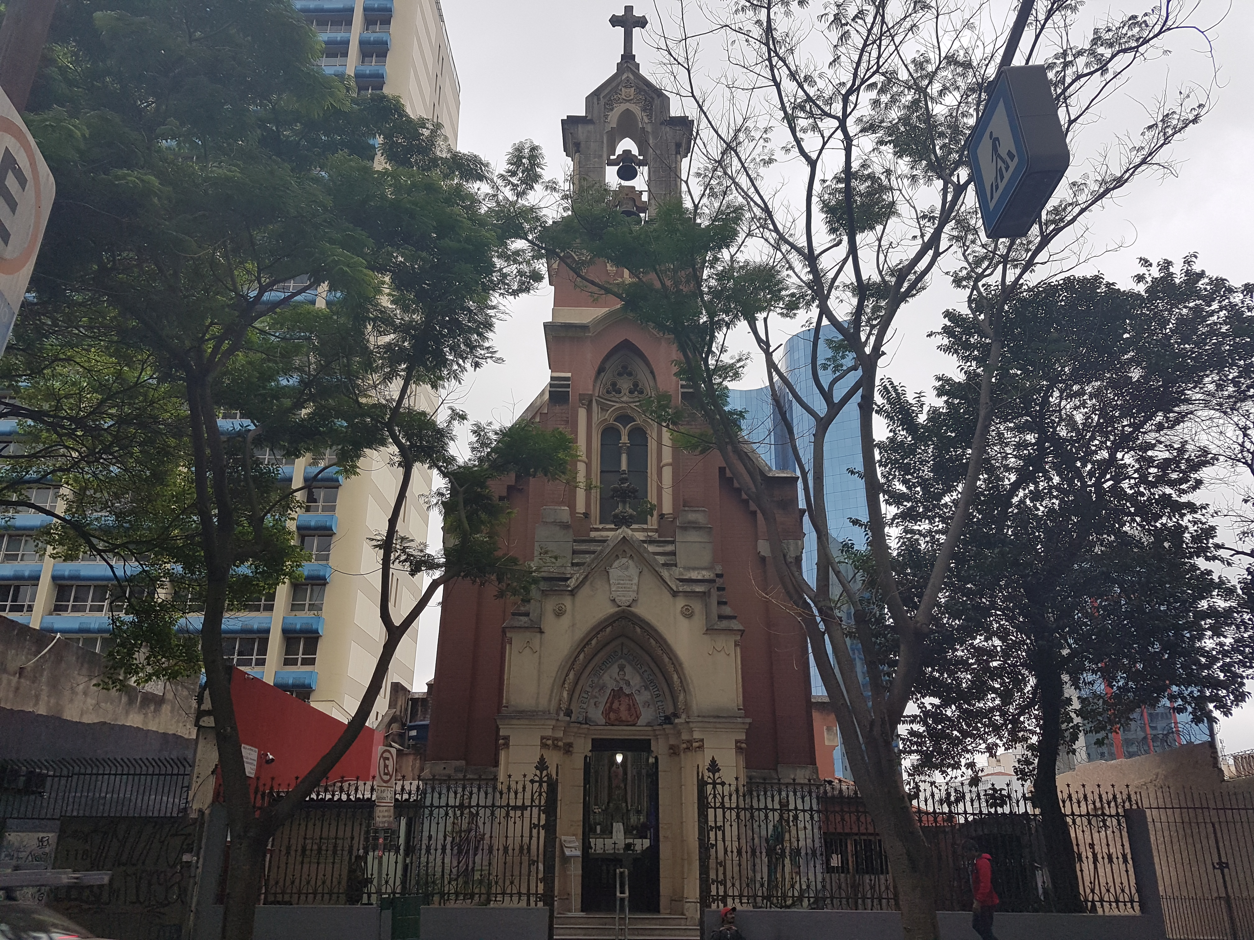 Capela do Menino Jesus e Santa Luzia, situada na Rua Tabatringuera, 104, região da Sé.